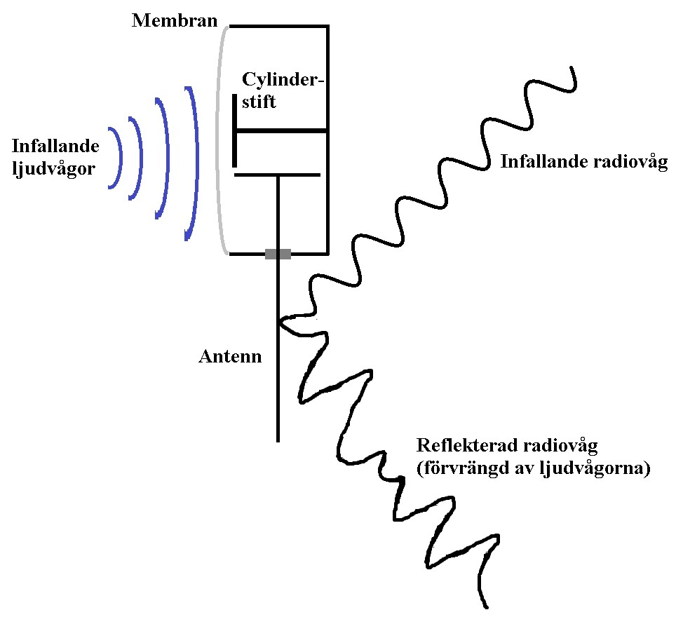 The Great Seal Bug